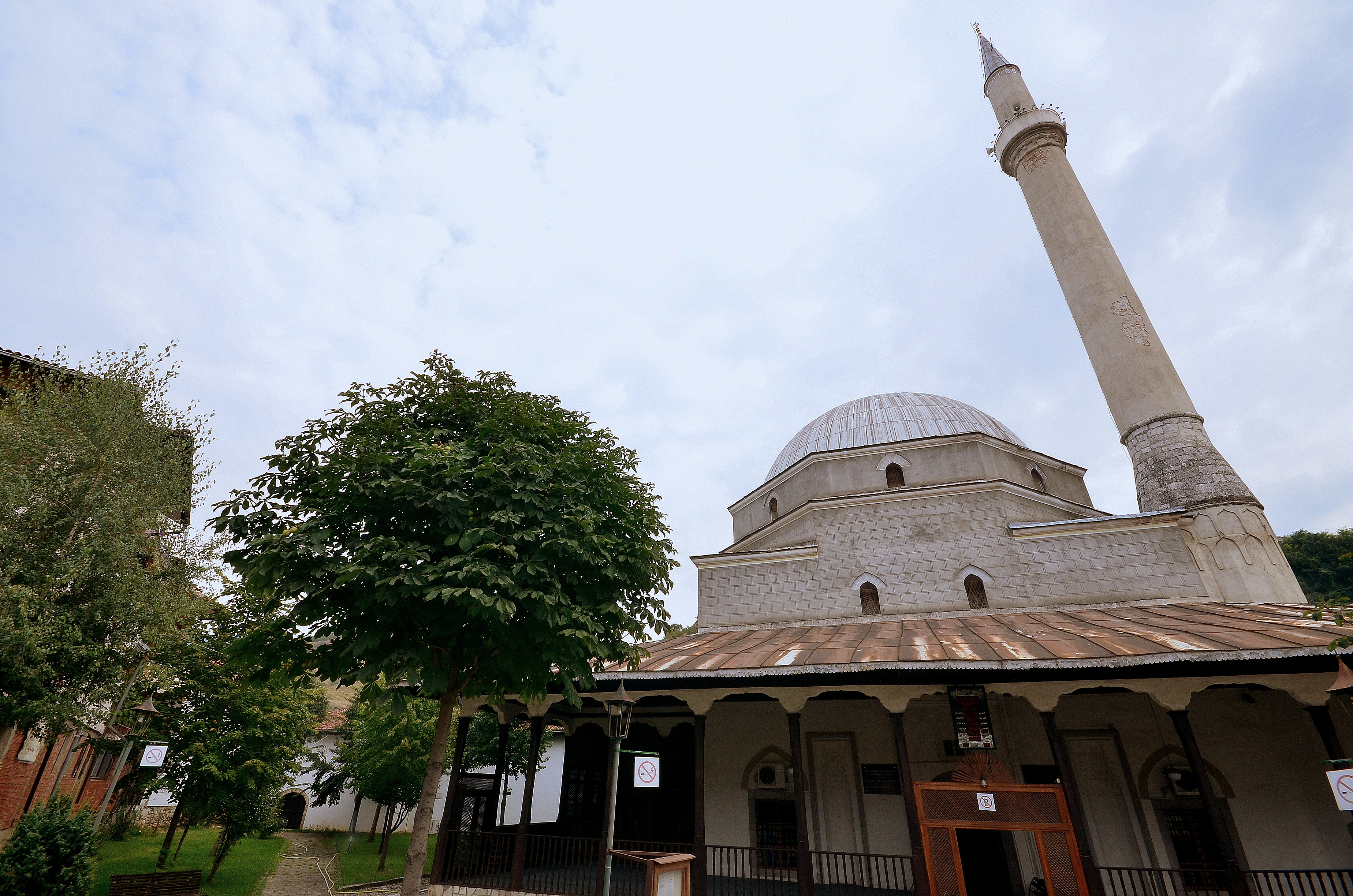 Xhamia e Mehmed Pashës